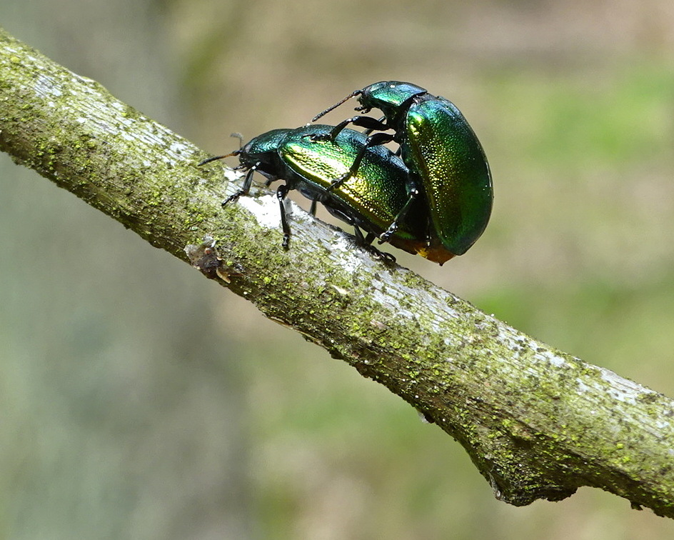 Erzfarbener Erlenblattkäfer, nördlich von Berlin Plagiosterna aenea (= Chrysomela aenea = Linaeidea aenea = Melasoma aenea)